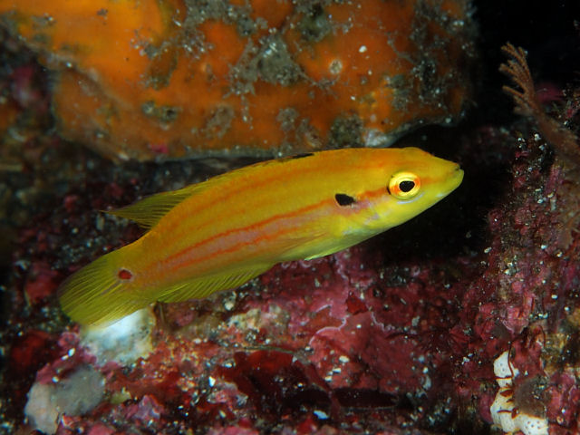 フタホシキツネベラ Bodianus bimaculatus